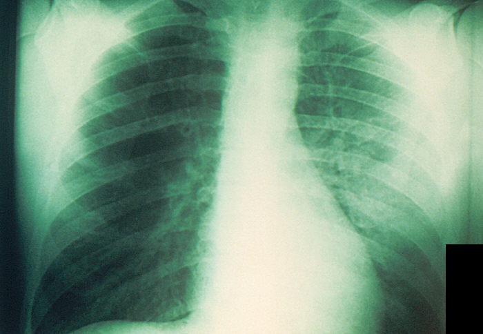 Röntgenbild einer Lunge, Lungenpest